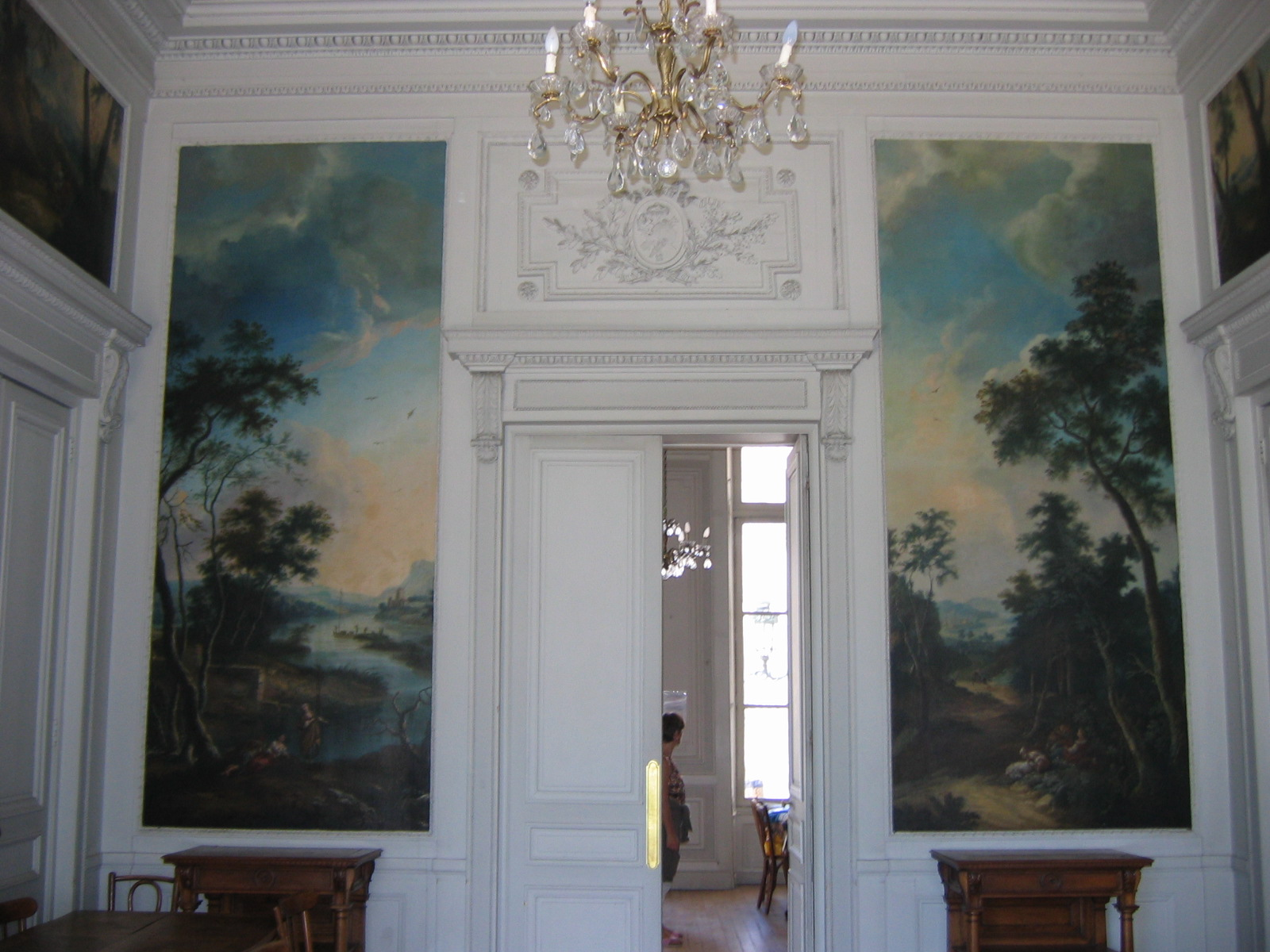 Intérieur de l'hotel de Mademoiselle de Condé à Paris. Photo prise lors des journées du Patrimoine.